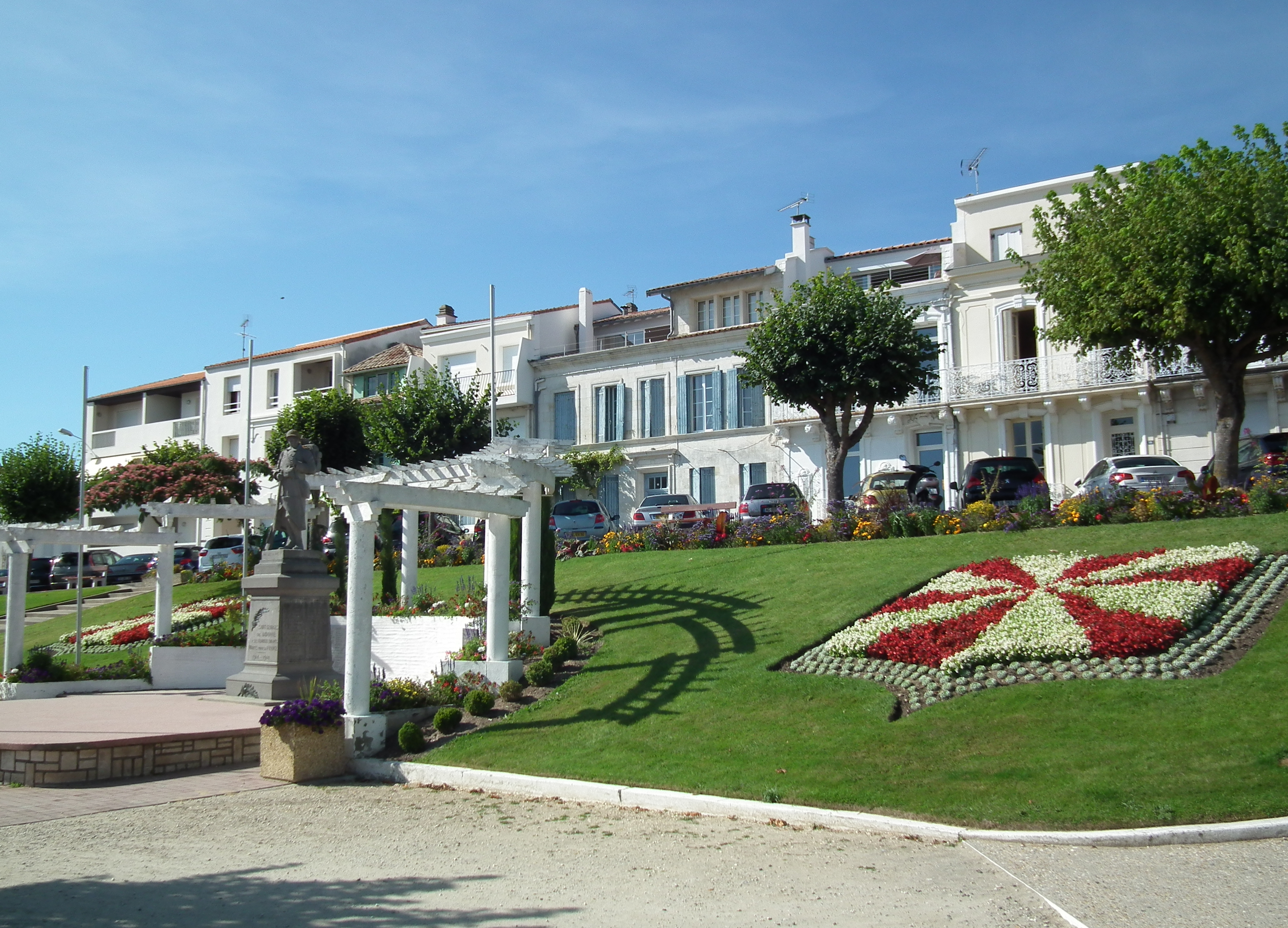 Place Michelet à Saint-Georges-de-Didonne